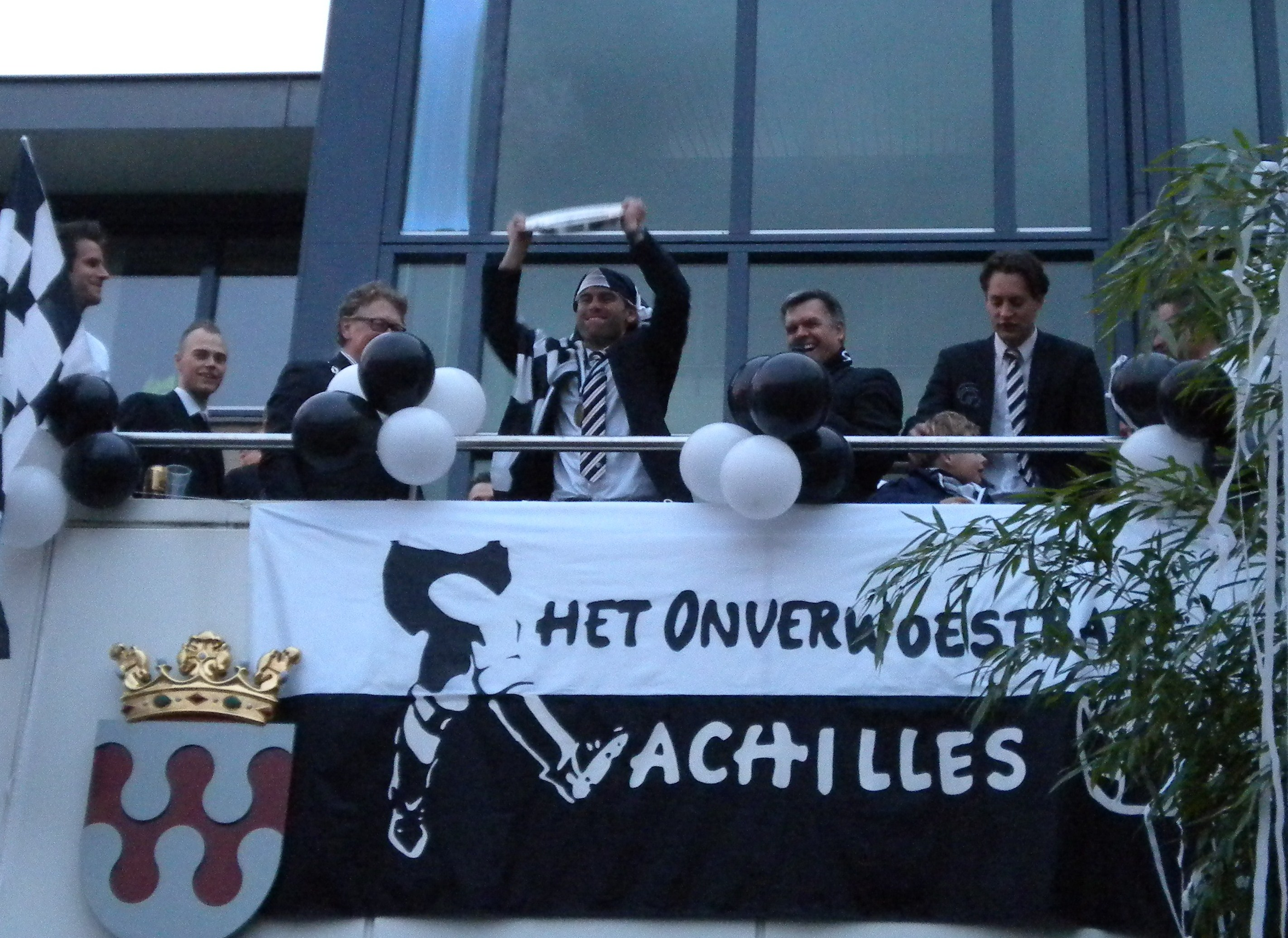 Thijs Hendriks (met schaal) tijdens de huldiging van Achilles '29 in Groesbeek na het behalen van het landskampioenschap van 2013.